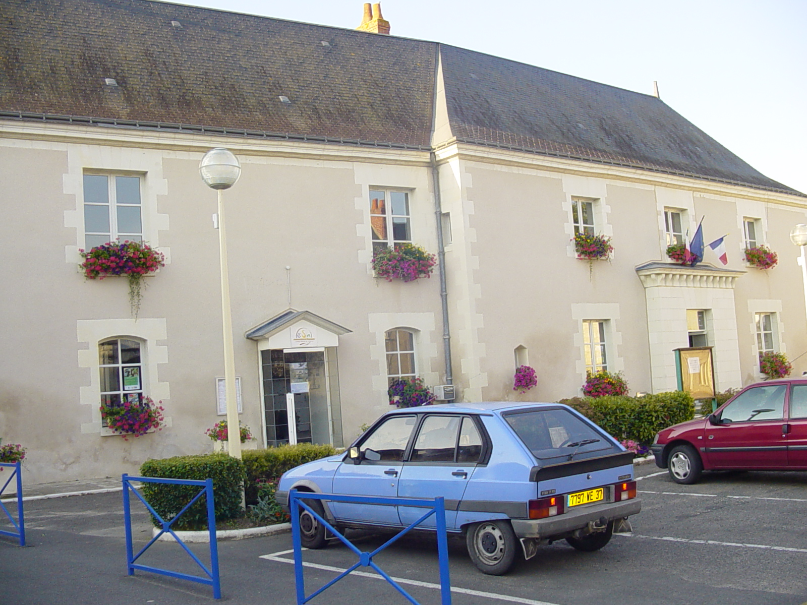 Mairie de Nouâtre